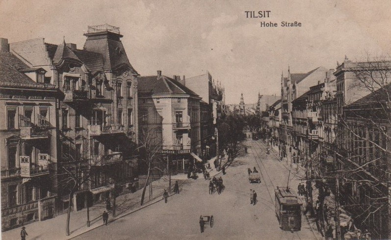 Tilsit/Ostpreußen: Hohe Straße